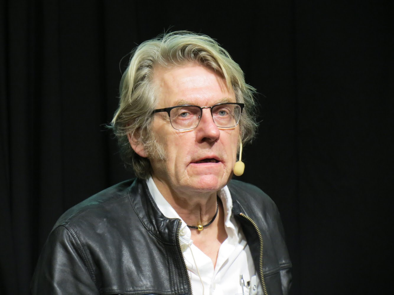 Arne Johnsson på Bokmässan i Göteborg 2018.